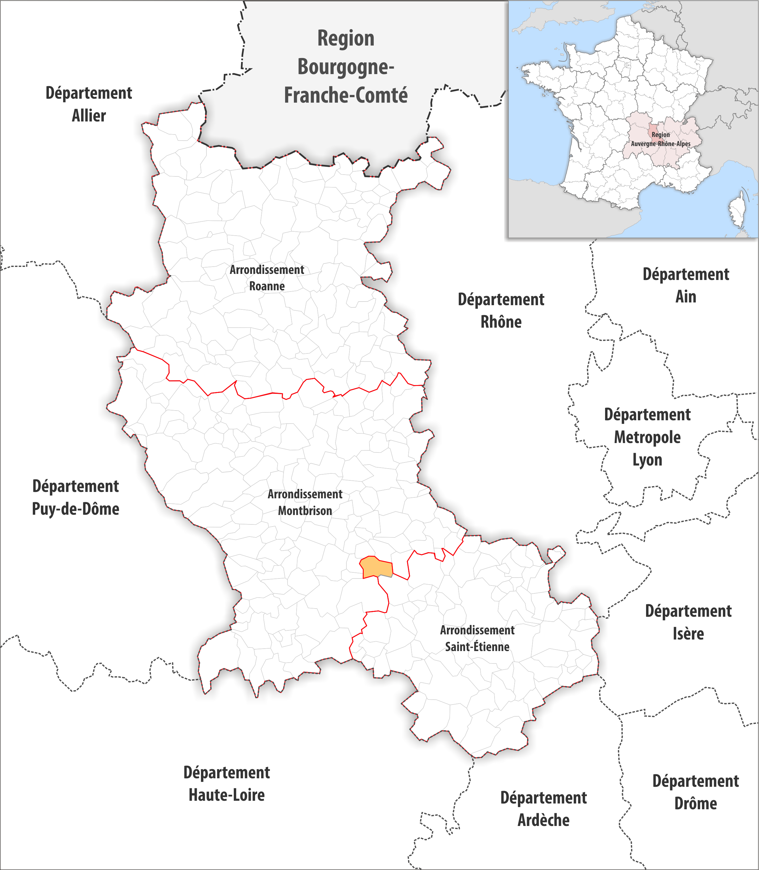 Arrondissements Anpassungen auf 2017 im Departement Loire